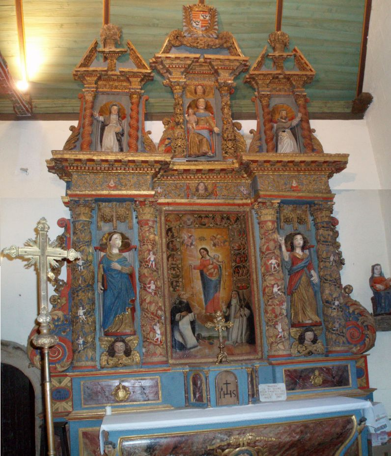 Retable monumental.